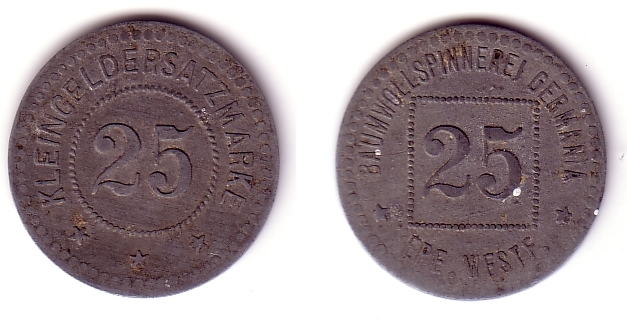 Notmünze der Baumwollspinnerei Germania Epe